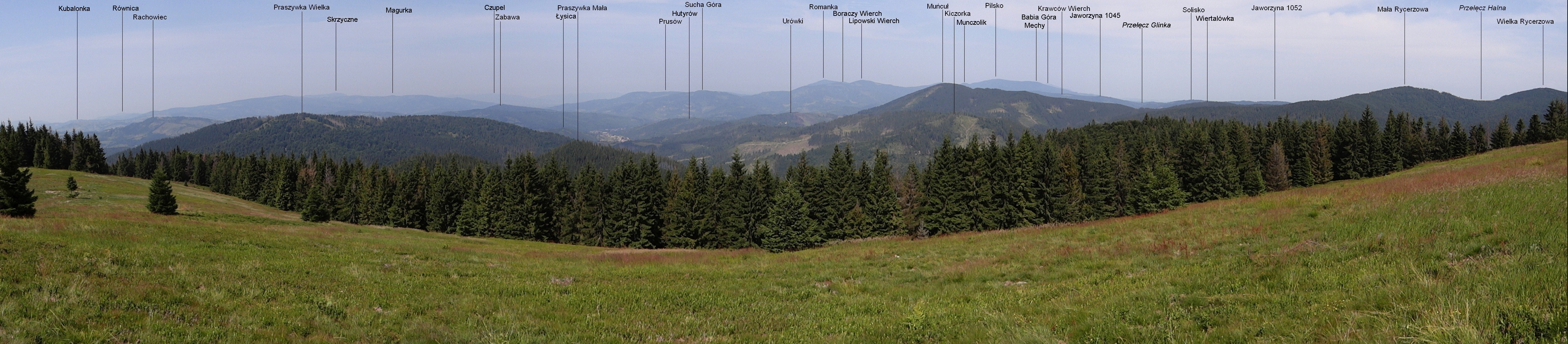 Panorama widokowa z Bendoszki Wielkiej